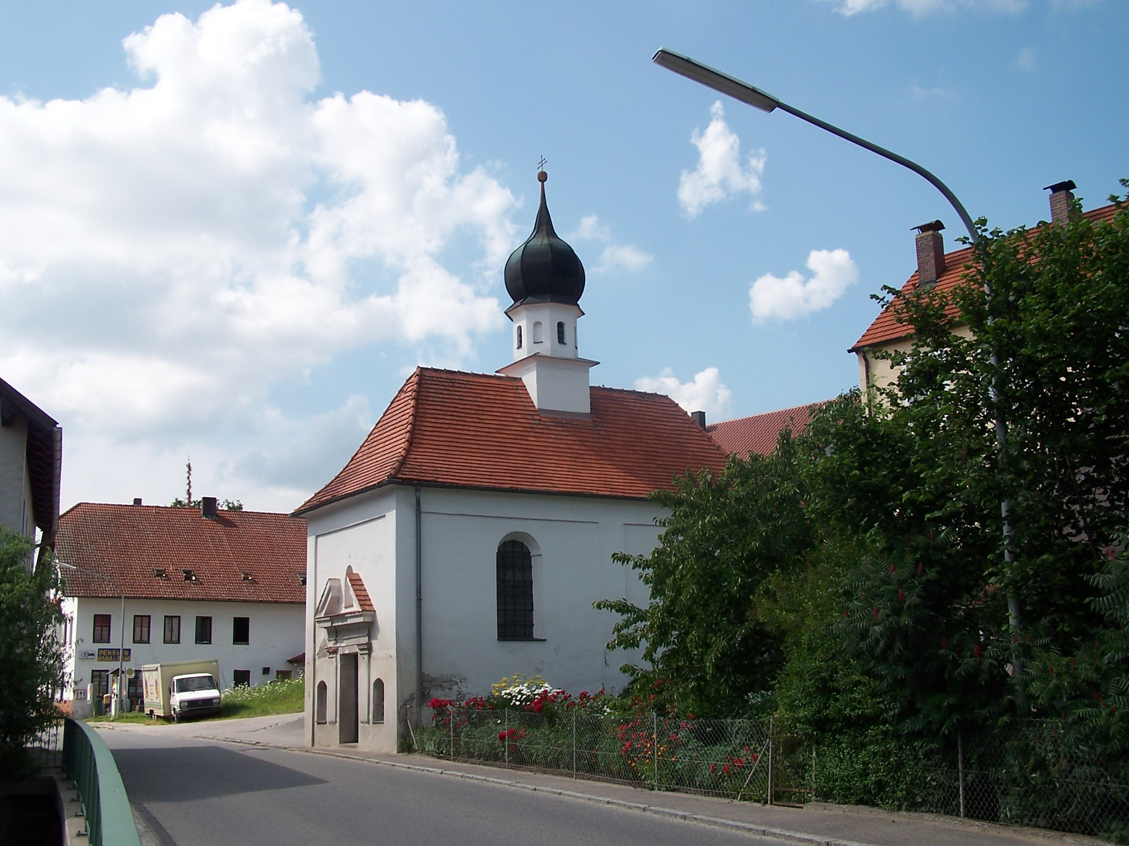 Hohenthann, Weihenstephan. Schlosskapelle St. Sebastian, kleiner Bau des 17. Jahrhunderts; mit Ausstattung; nördlich vom Schloss an der Straße.